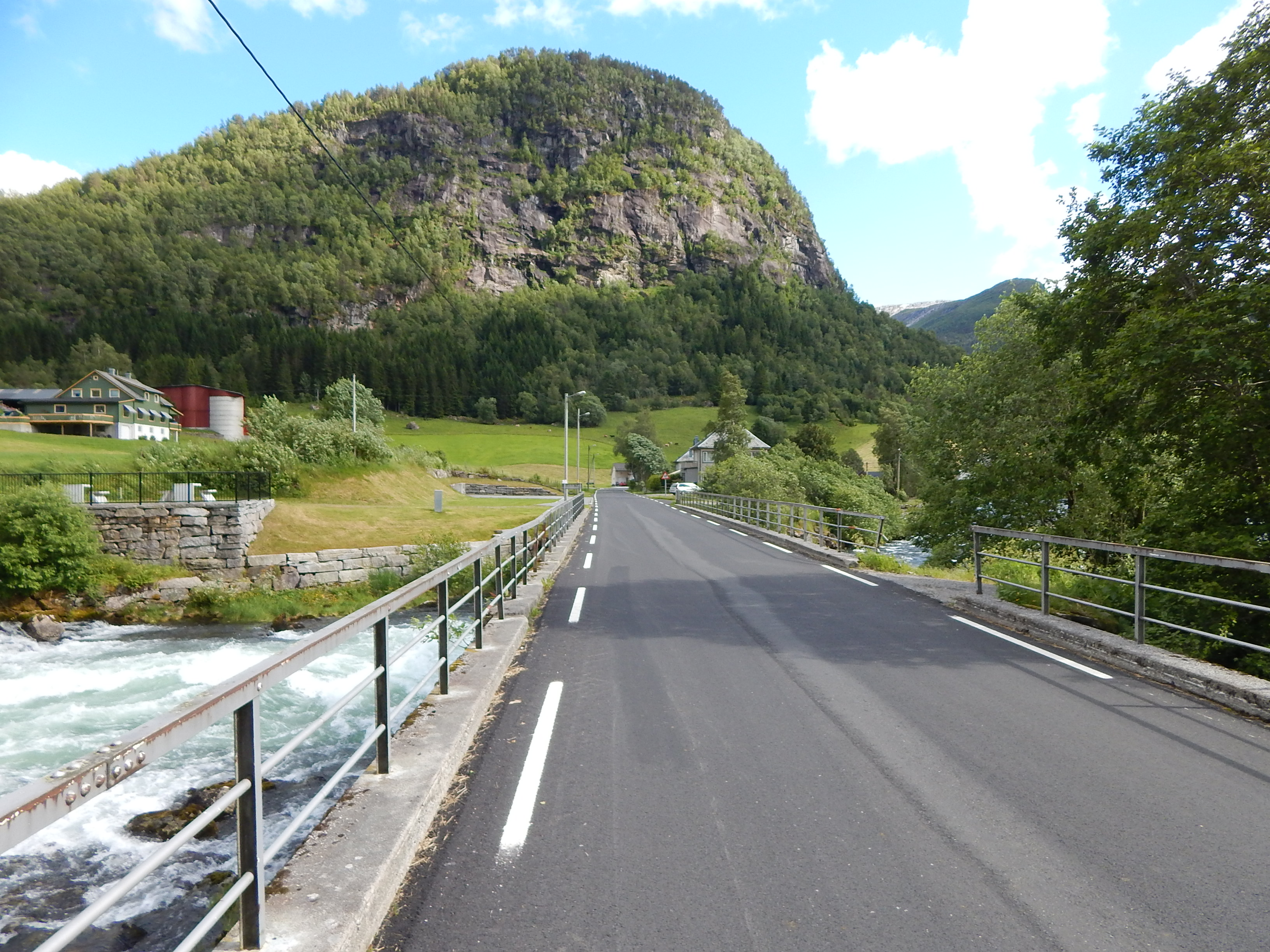 Fylkesvei 613 (tidl. 13) over Hellebust bru i Viksdalen